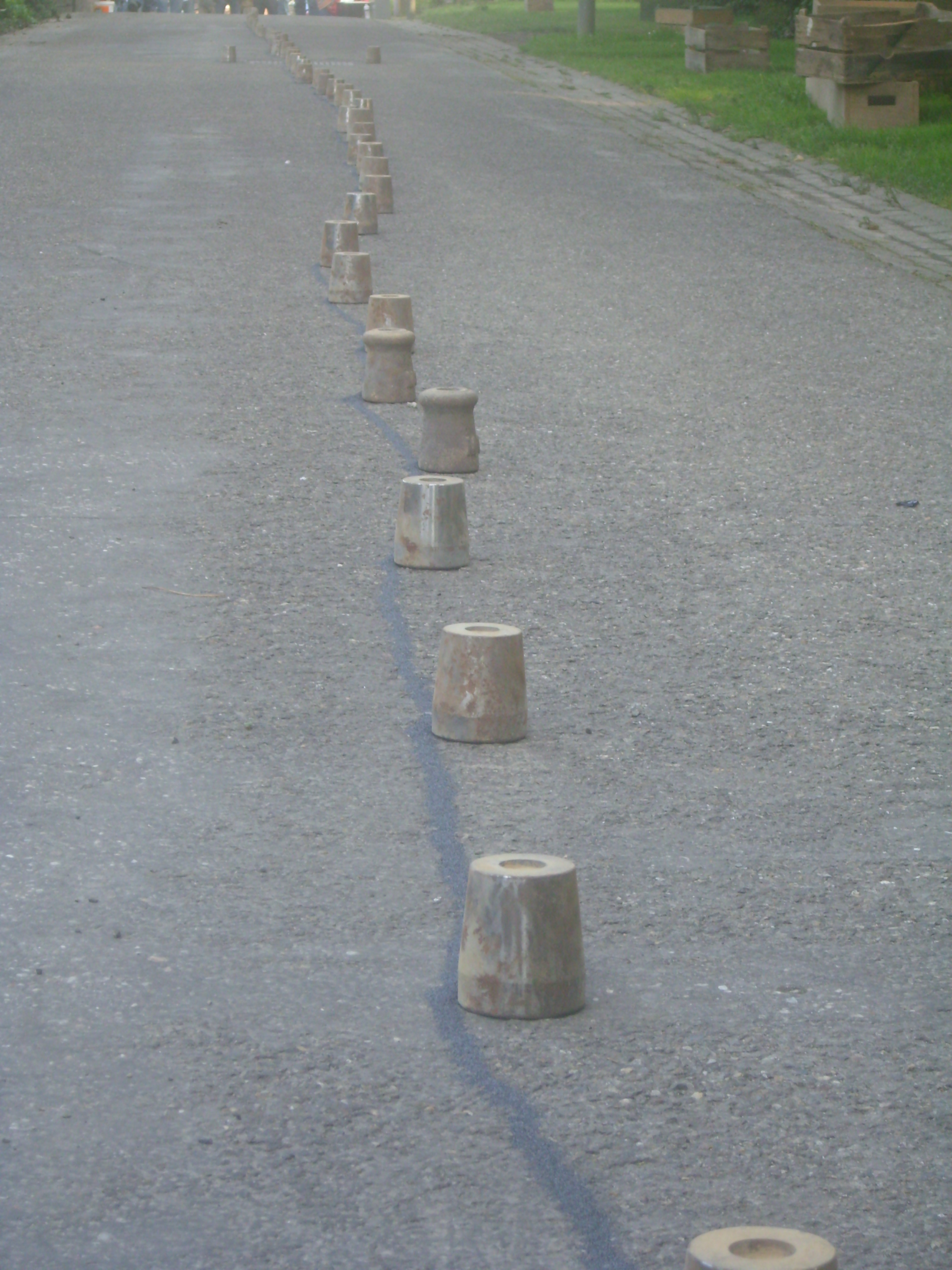 Rij geladen kruitkamers, verbonden met een kruitspoor, gereed om af te vuren.